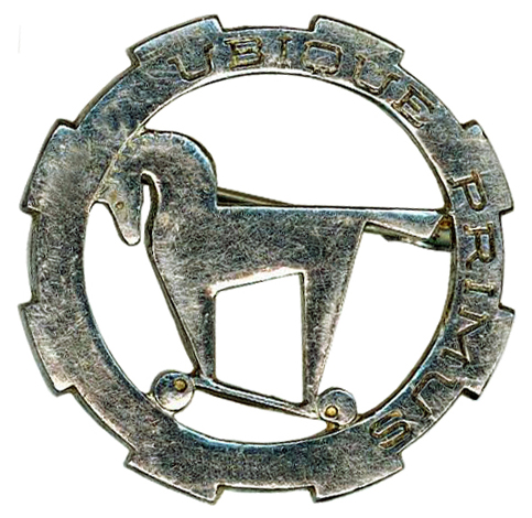 Insigne régimentaire du 1er régiment de chasseurs d'Afrique